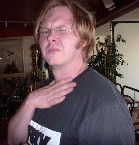 Bild av Mattias "Matti" Alkberg, tagen på festivalen Accelerator i Stockholm 2005-07-07. Bilden är tagen av Patrik Lermon. Bilden publiceras under GFDL. Fotografen har faktiskt ingen aning om hur det kom sig att Mattias valde att posera på detta sätt. Fotografen är tacksam för att Mattias ställde upp på att vara med på bild.